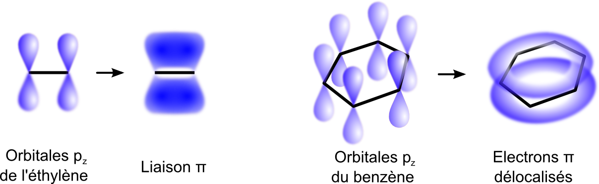 délocalisation des électrons pi de la molécule de benzène, et comparaison avec la liaison pi de l'éthylène (version png car en svg les orbitales s'affichent mal)